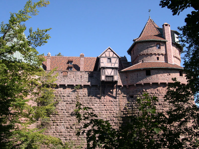 Château du Haut-Koenigsbourg, partie arrière du château - France, septembre 2004